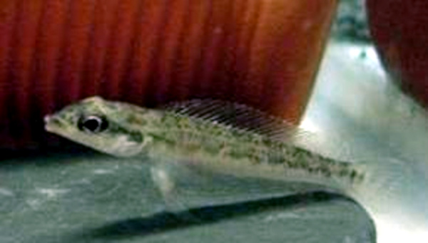 Teleocichla cinderella 這是一隻zh:仙女短鯛（Teleocichla cinderella）。這張照片是在2004年1月由mingwangx拍攝成的。